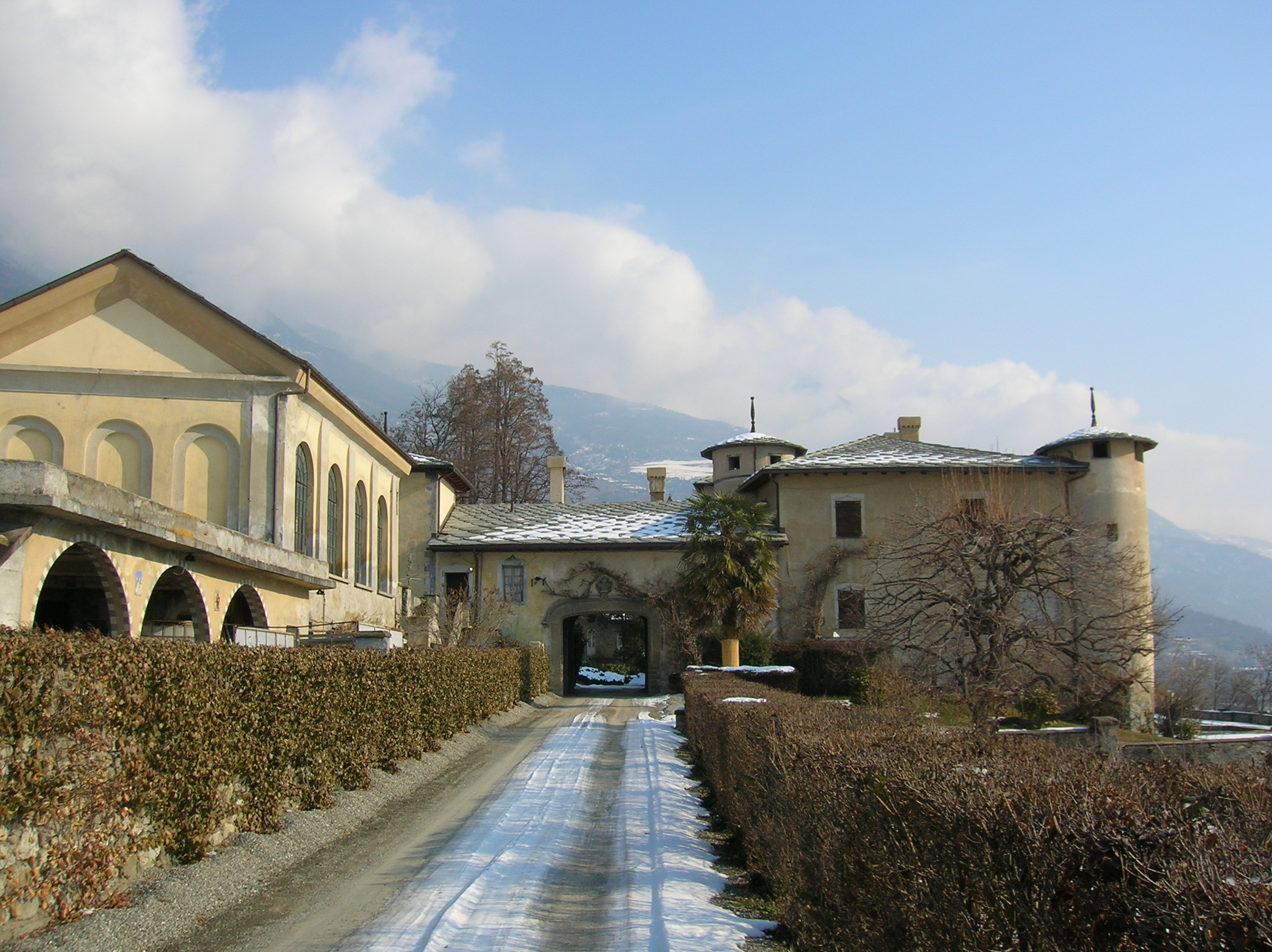 Castello Passerin d'Entrèves a Saint-Christophe, Valle d'Aosta, Italia.